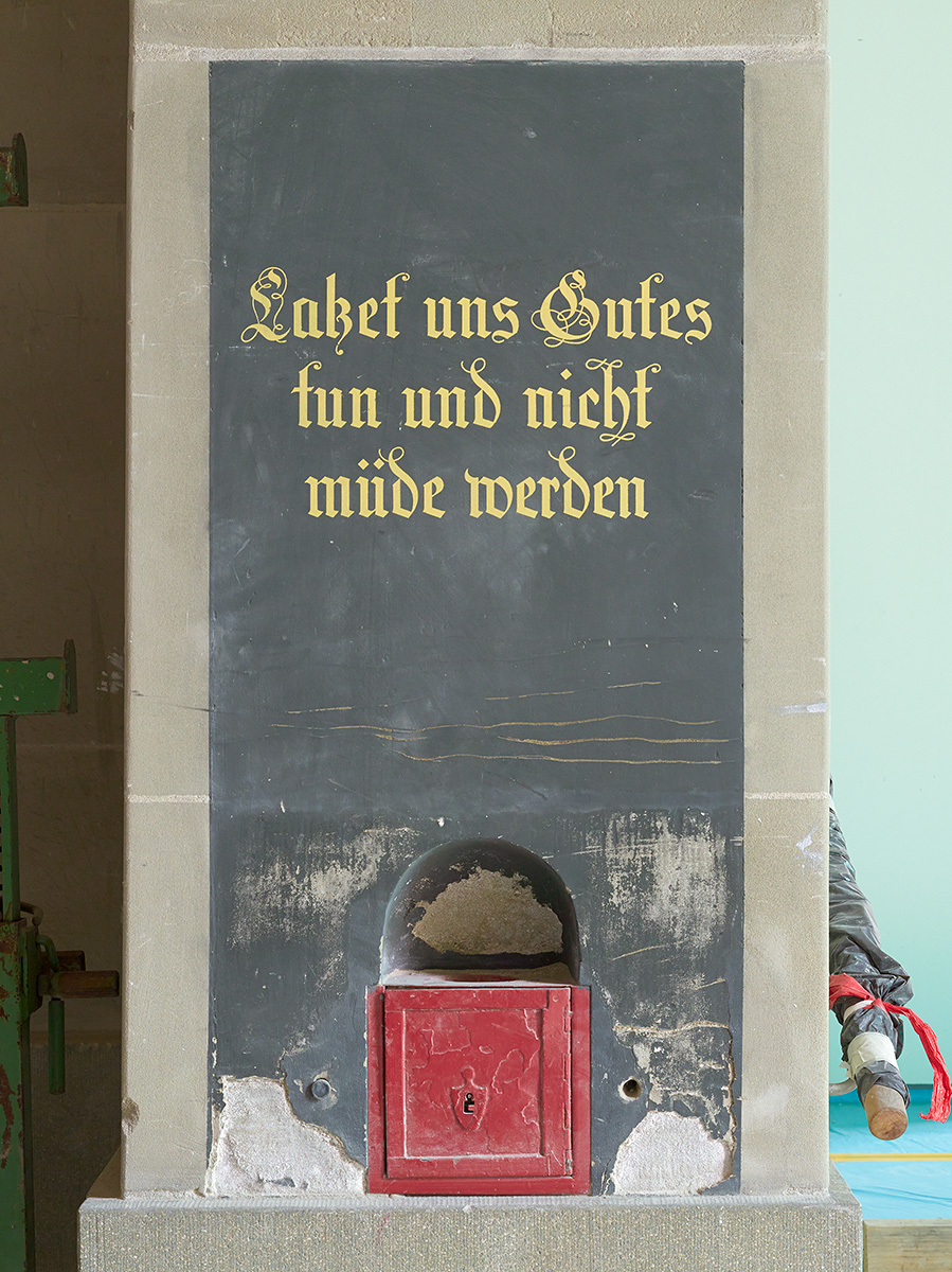 Dokumentation Baustelle, Raum E001